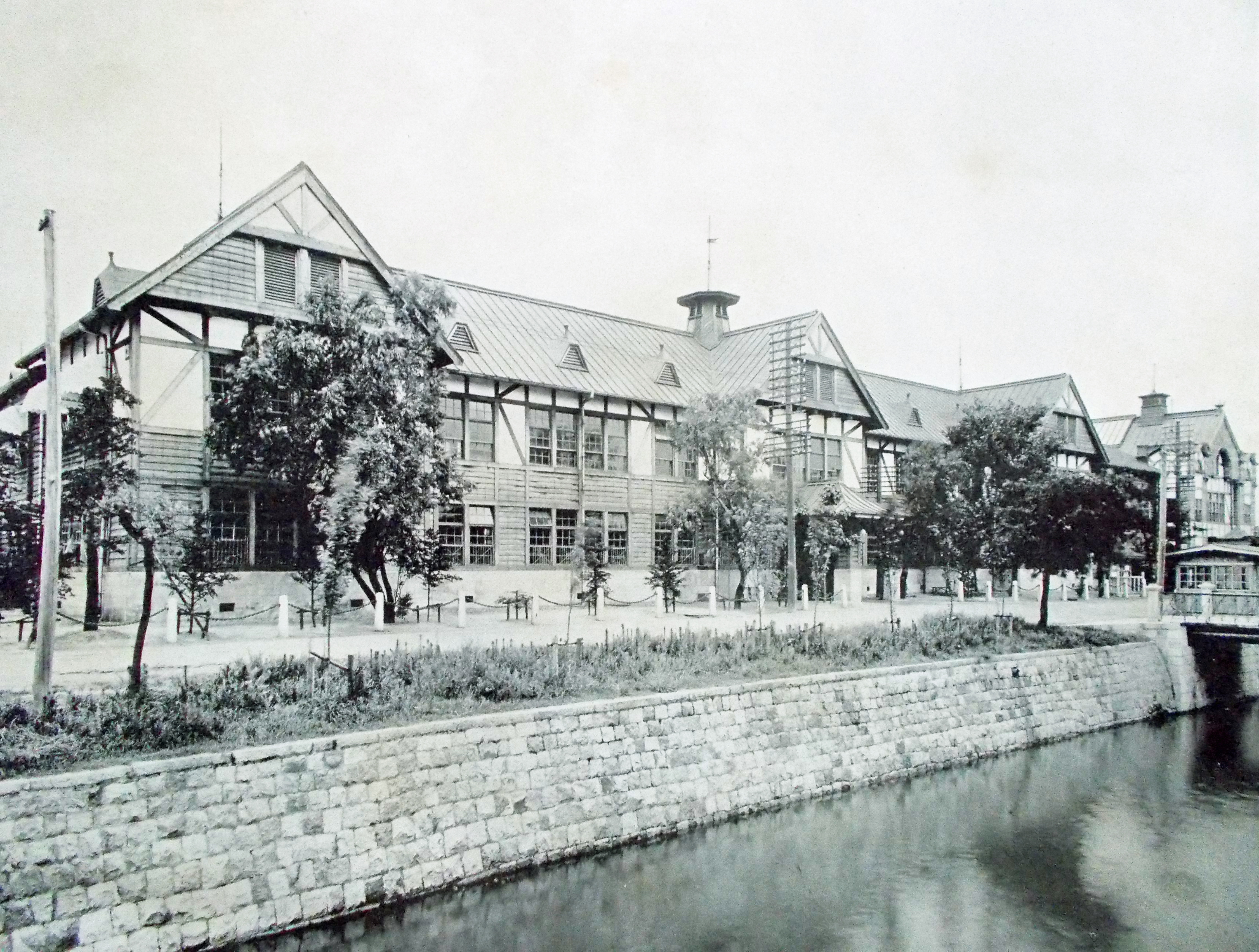 堂島浜にあった、二代目大阪市庁舎。 大正三年「大阪府写真帳」より。